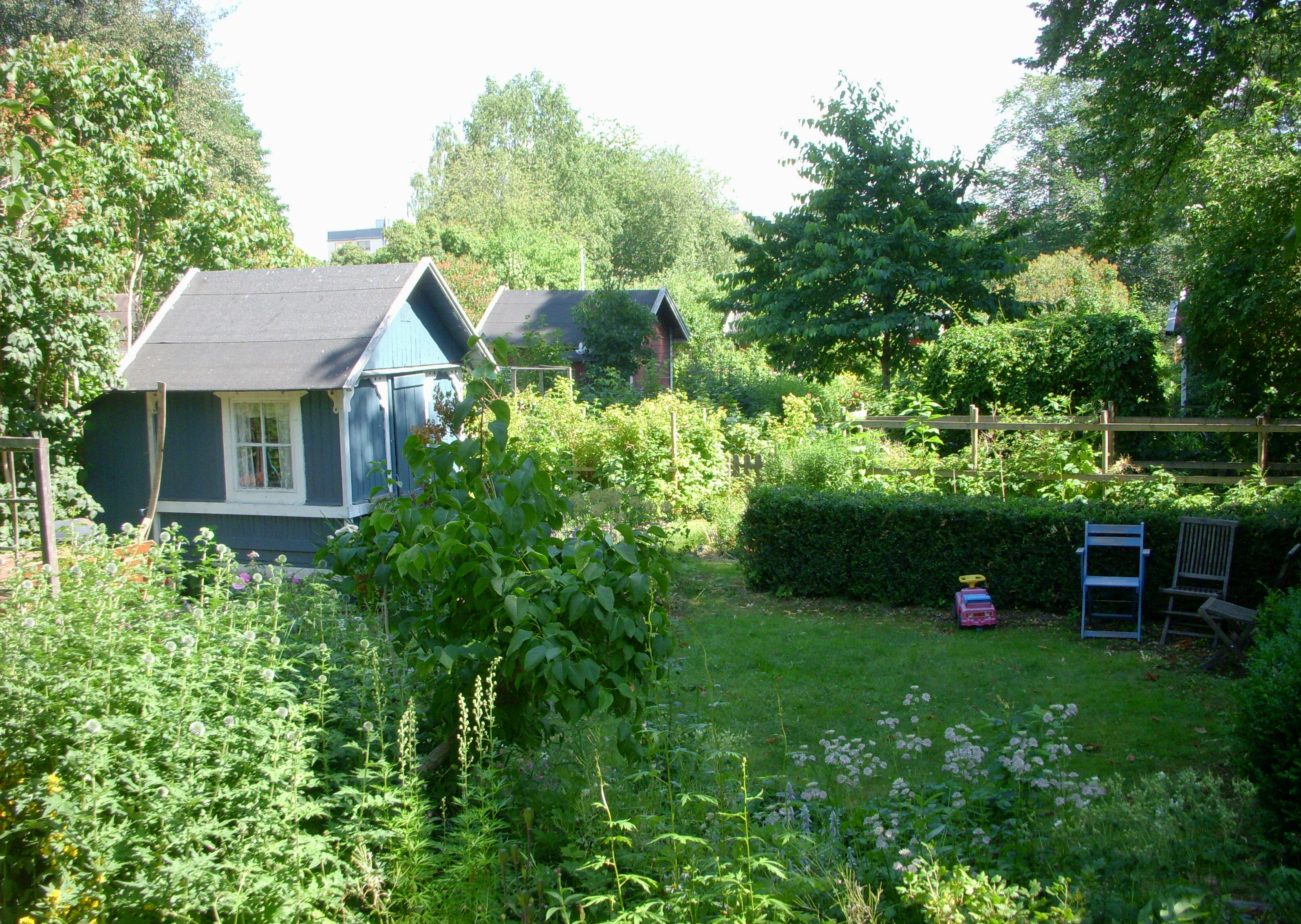 Barnängens koloniområde på Södermalm i Stockholm